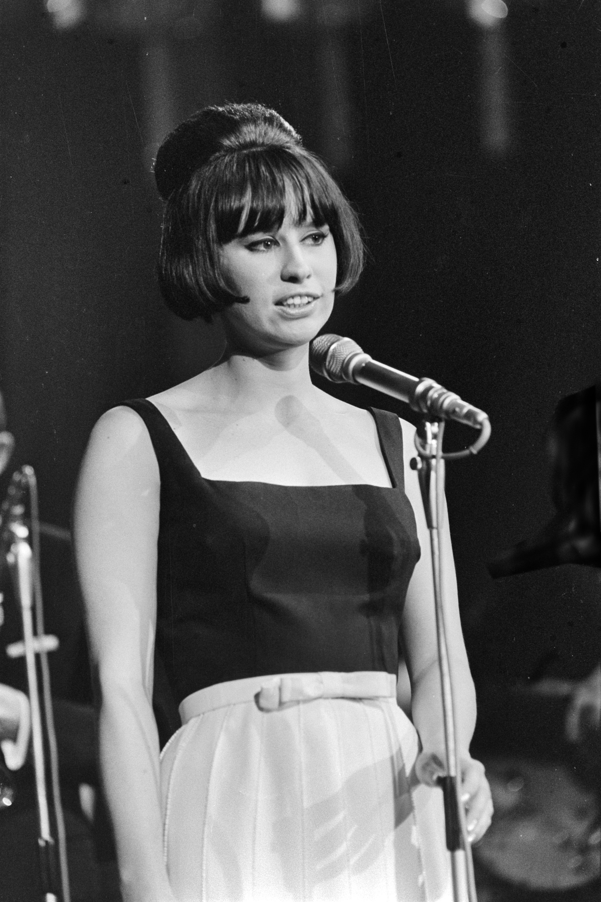 Optreden van de Amerikaans-Braziliaans zangeres Astrud Gilberto, Amsterdam 1966.